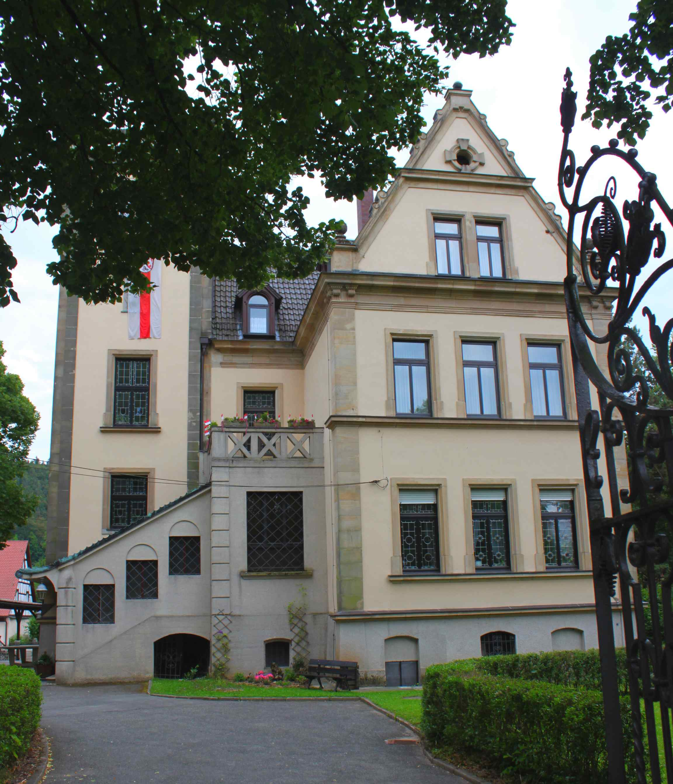 Das Vorraer Schloß liegt in einem Park in der Ortsmitte